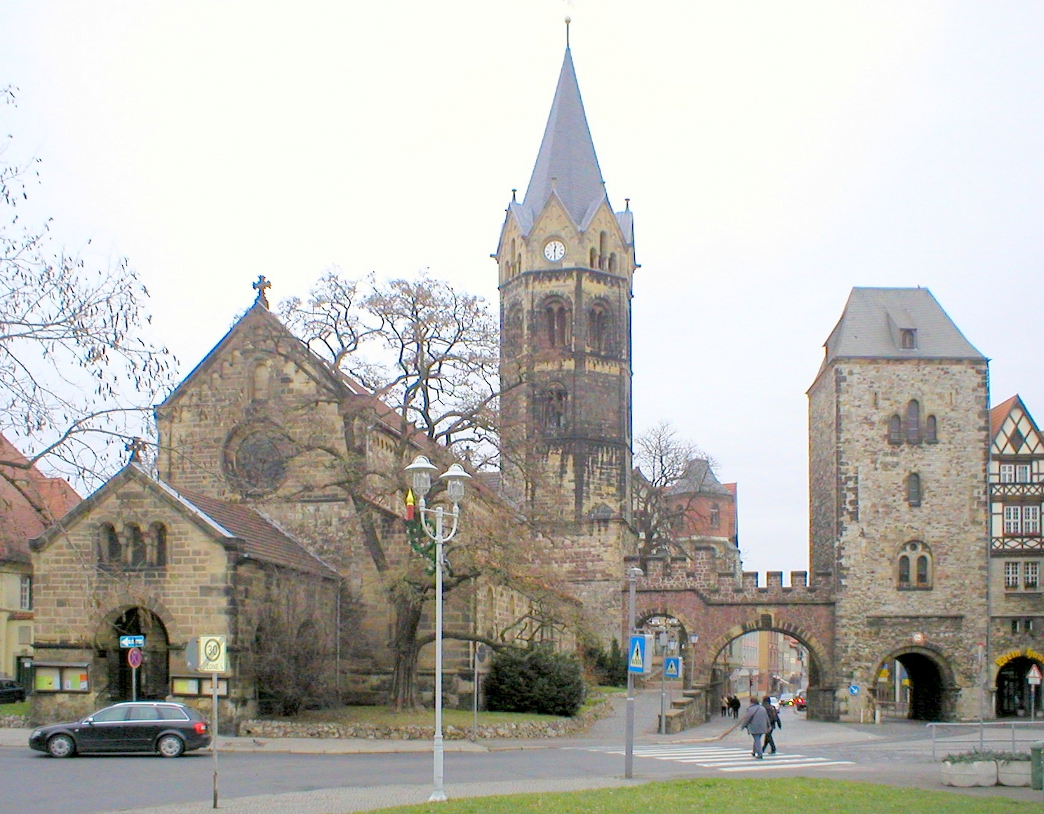 Nikolaikirche und Nikolaitor am Karlsplatz